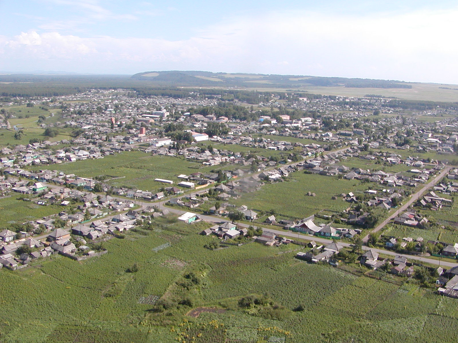 Das Dorf Karatusskoje aus der Luft